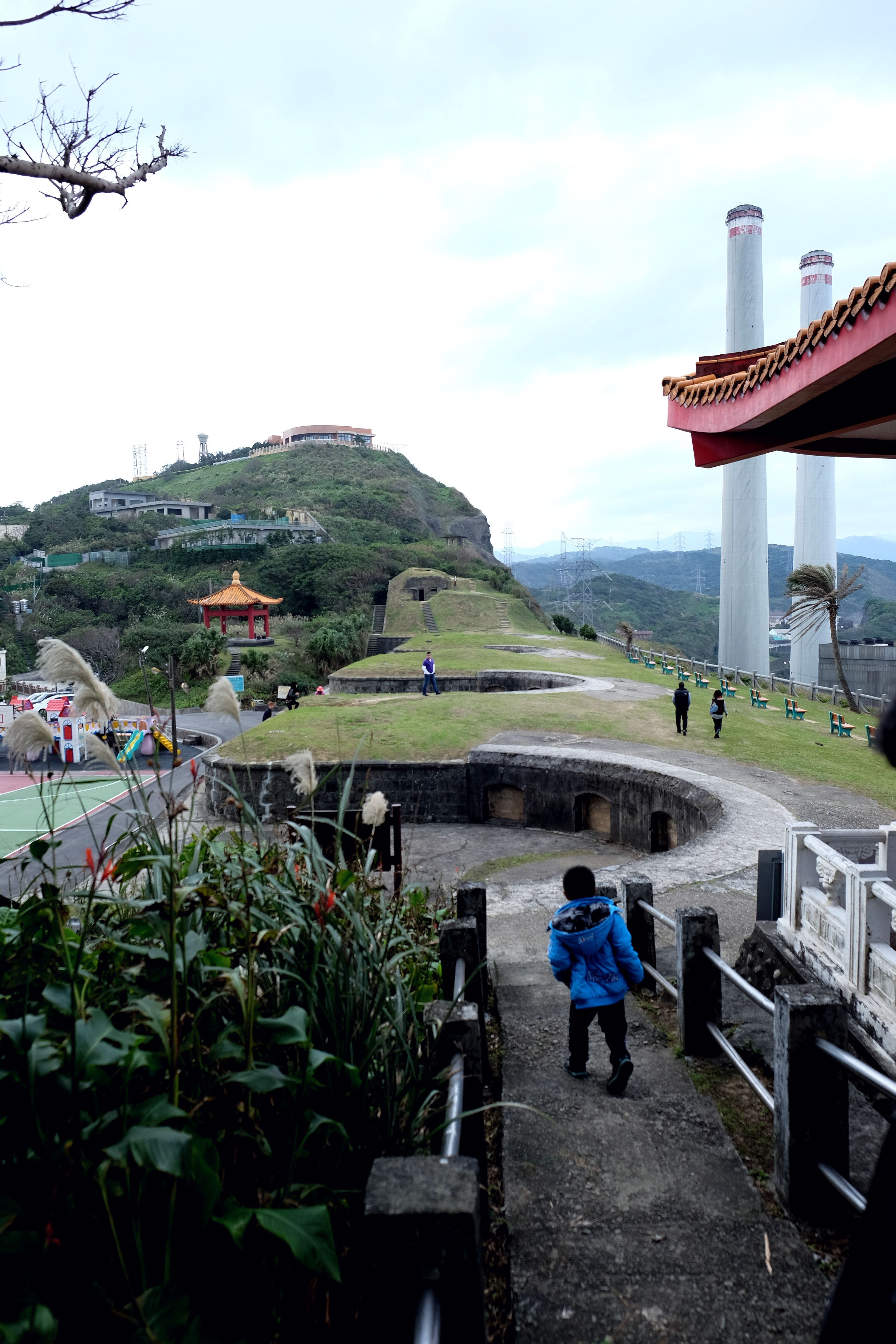 白米甕砲台